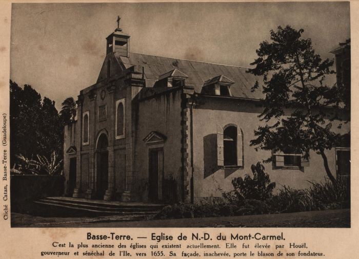 Basse-Terre . - Eglise de N.D. Du Mont-Carmel.